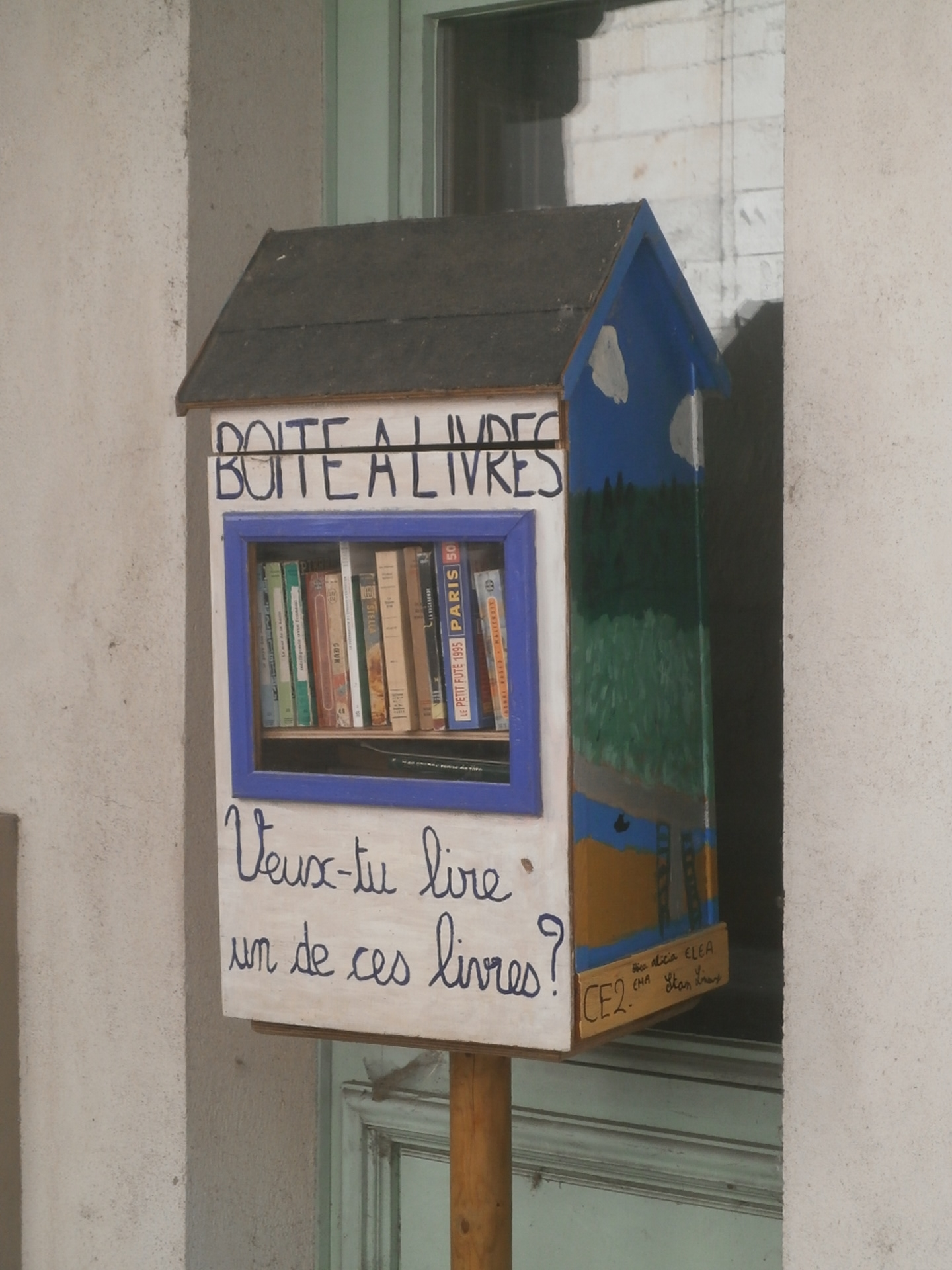 Les livres en libre accès (Candes-Saint-Martin)